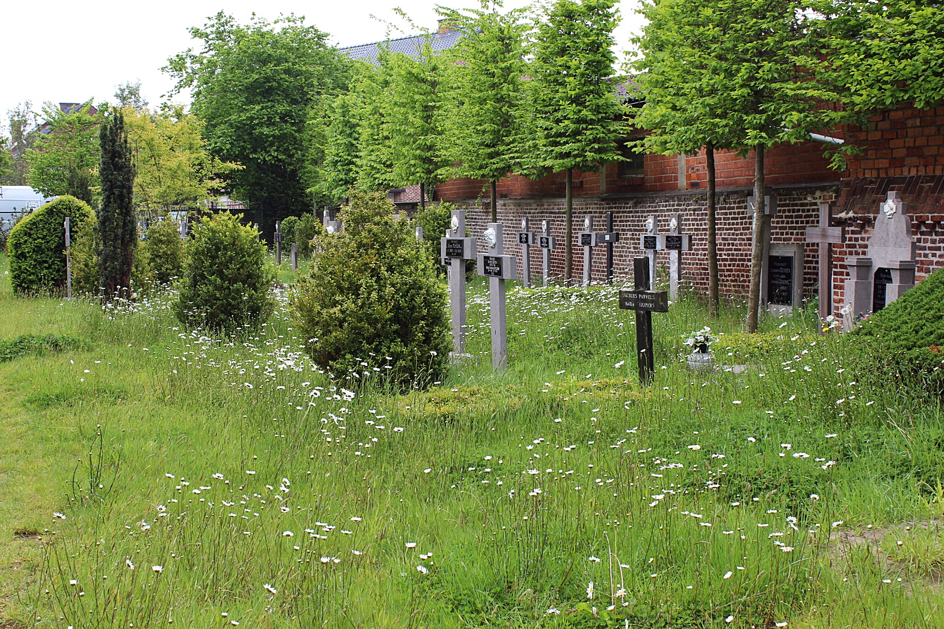 Wolfsdonk - Sint-Antonius Abt Kerk - Kerkhof algemeen aspect van bloemenweide